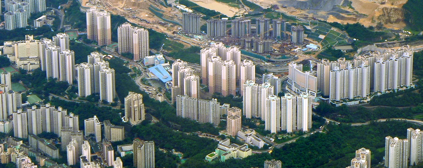 Sau Mau Ping Public Housing Estate Overview